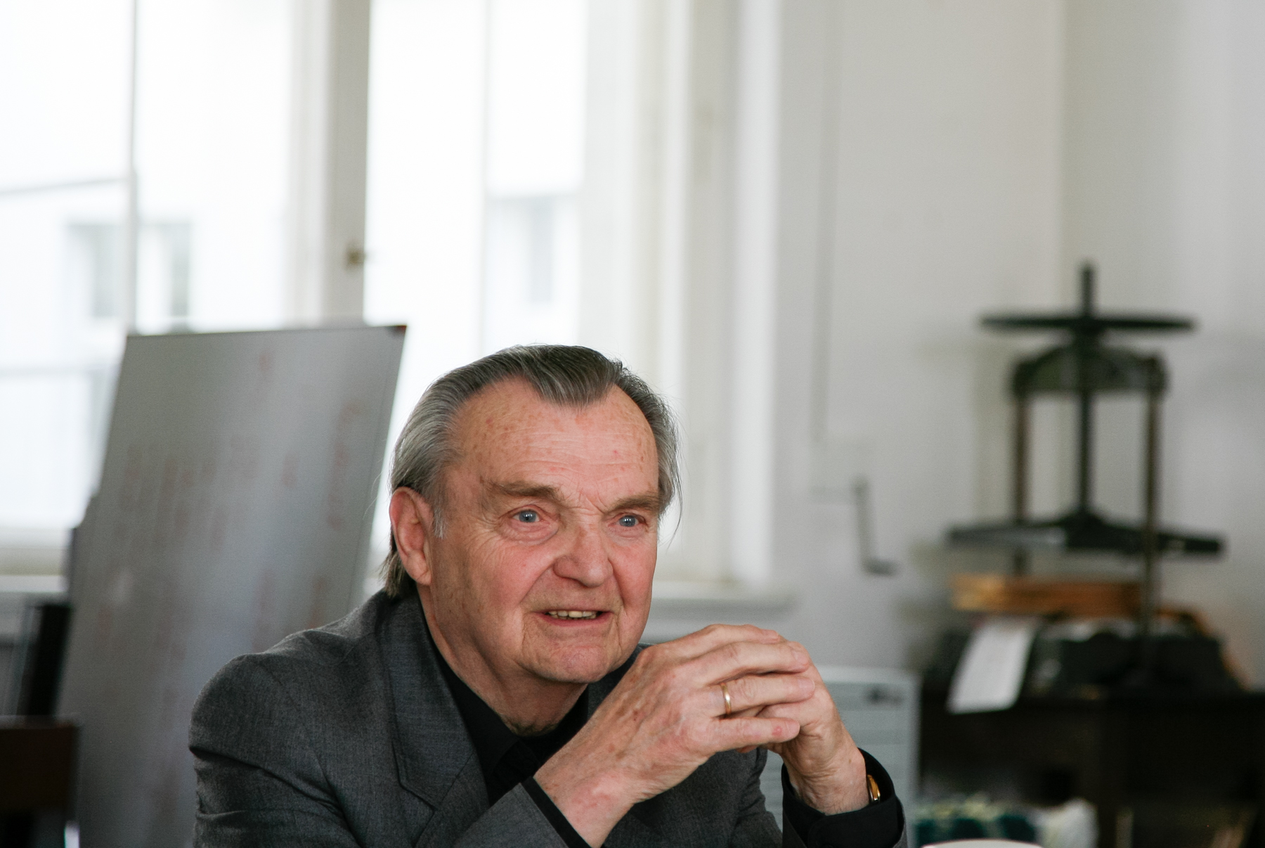 Günther Regel, Kunstpädagoge, 2011